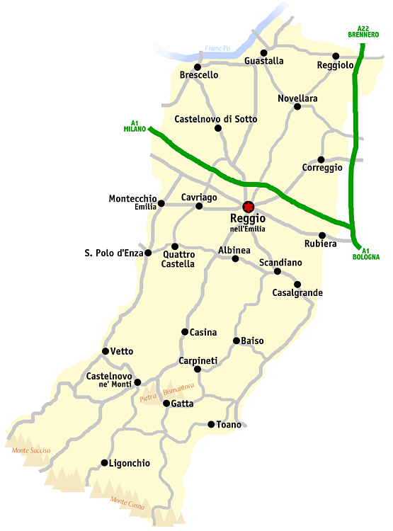 Kaart van de provincie Reggio nell'Emilia